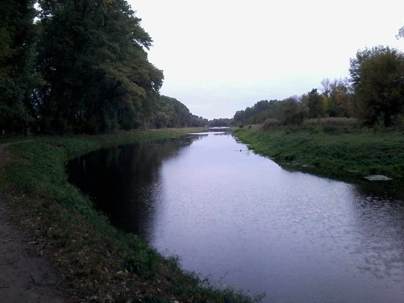 Ріка Остер